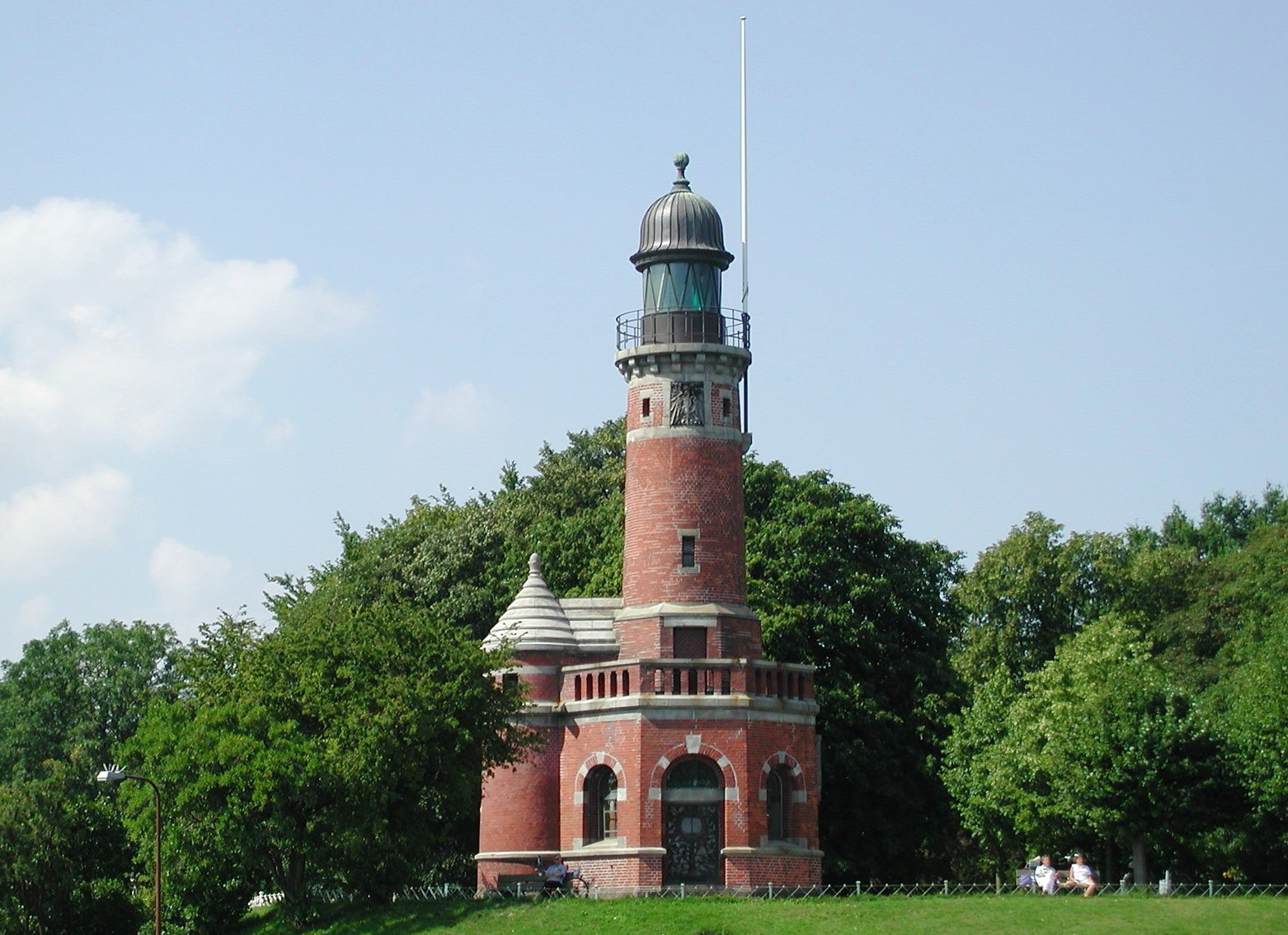 Leuchtturm Kiel-Holtenau an der Schleuse zum Nord-Ostsee-Kanal, Einweihung: 1895.